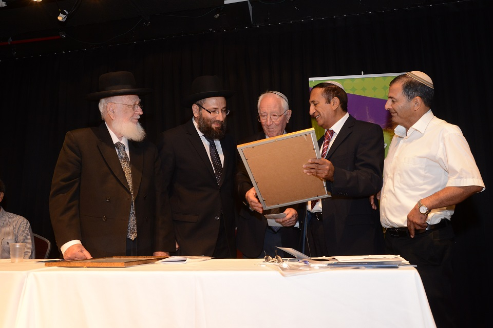 קבלת פרס עמינוח עם הרב צפניה דרורי